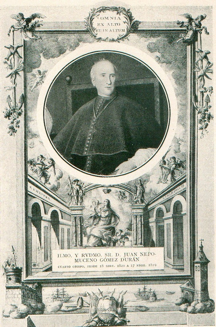 Obispo español del siglo XIX, obispo de las diócesis de Santander y de Málaga